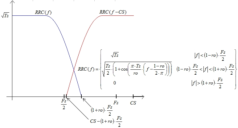 Esempio di spettro interferente e filtraggio di ricezione di tipo Root of Raised Cosine